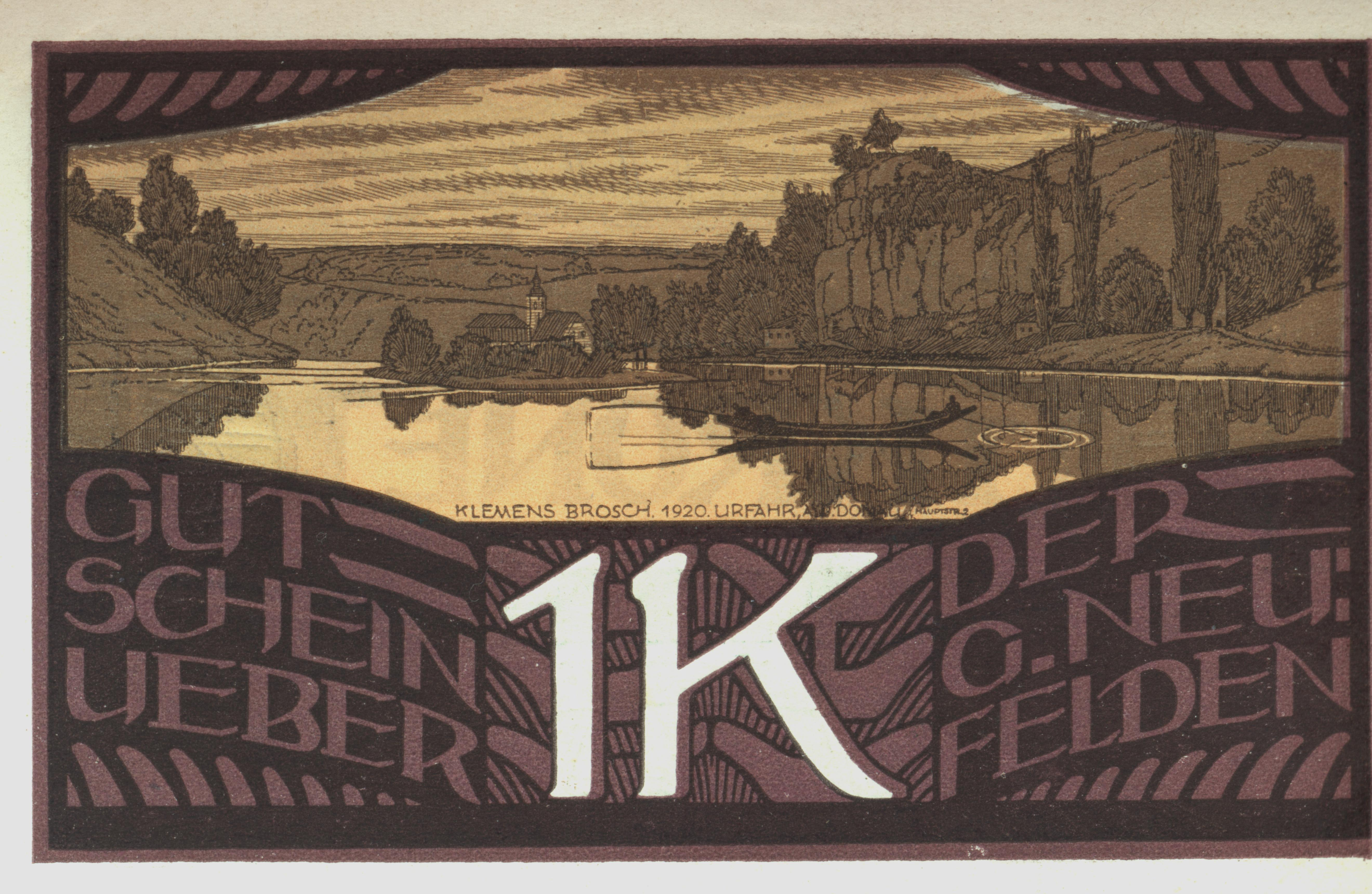 Notgeld der Gemeinde Neufelden